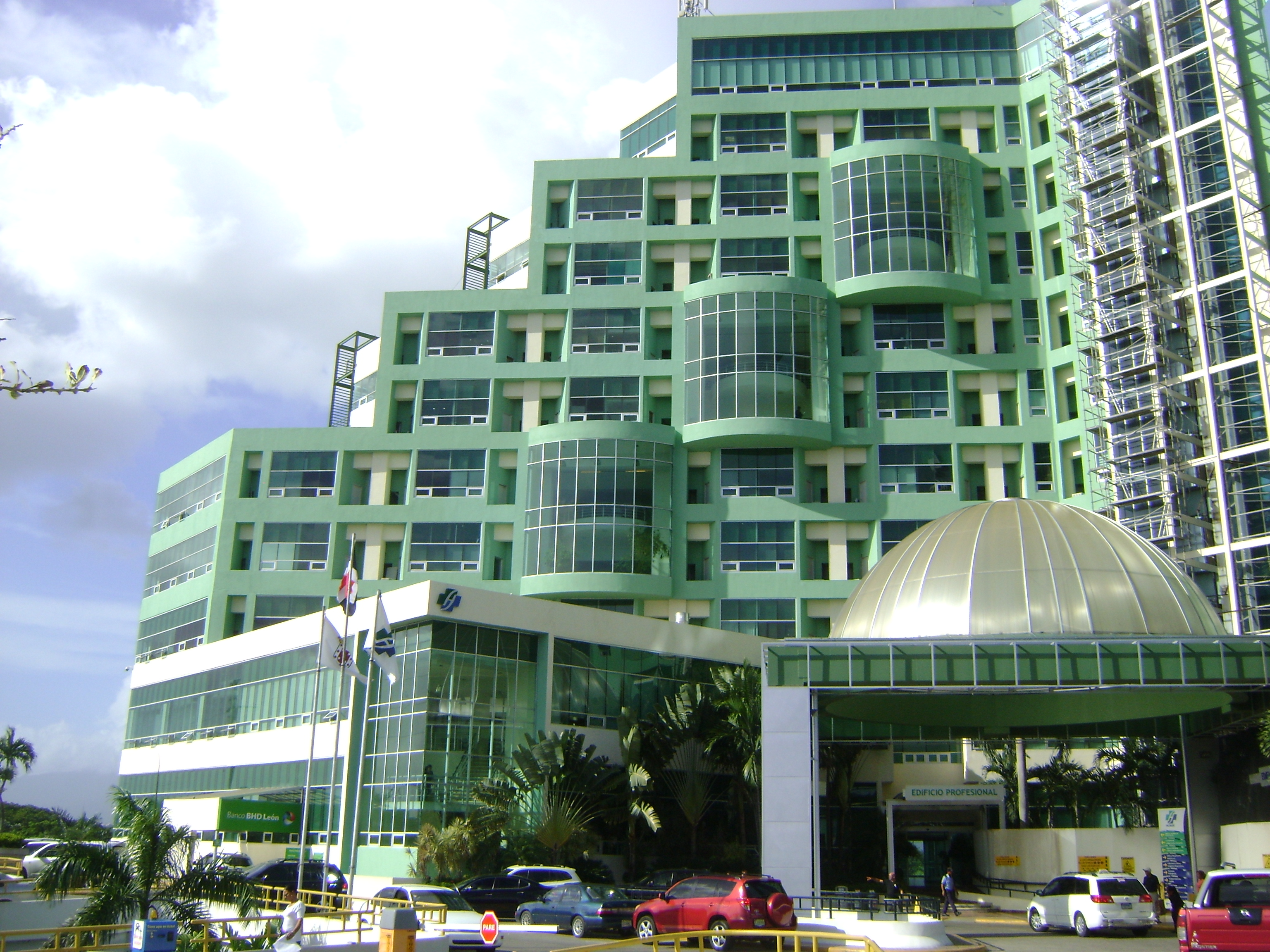 Linker deel van het HOMS aan de voorzijde.